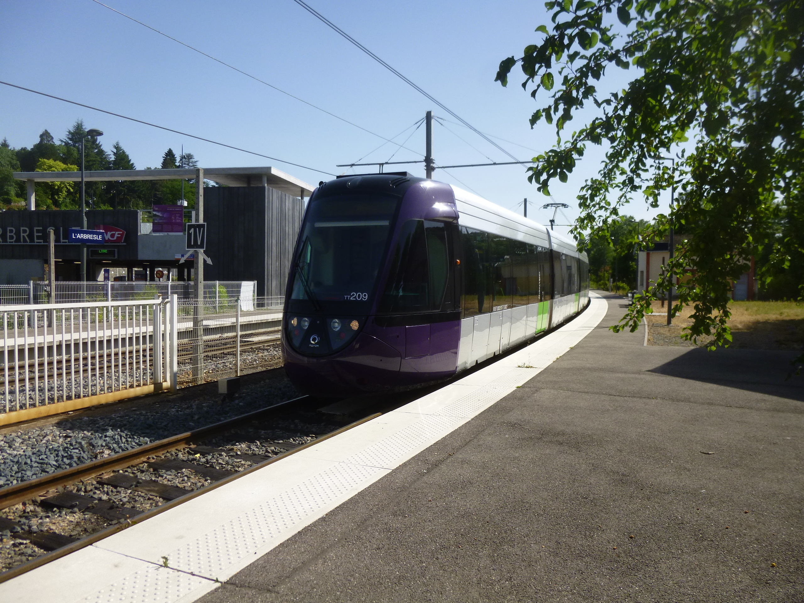 Le tram-train en provenance de Sain-Bel entrant en gare de L'Arbresle